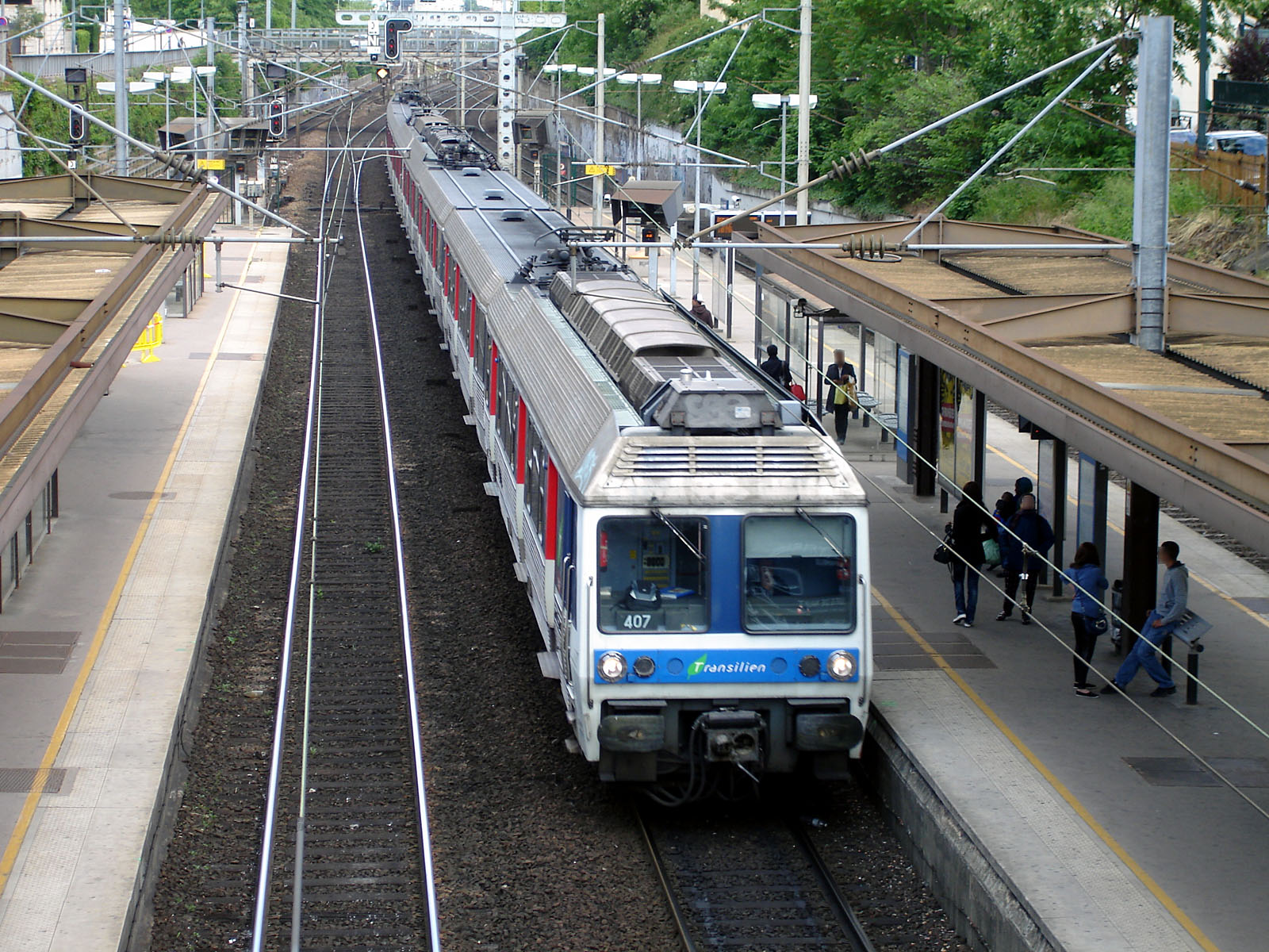 La gare de Maisons-Laffitte, Yvelines, France.